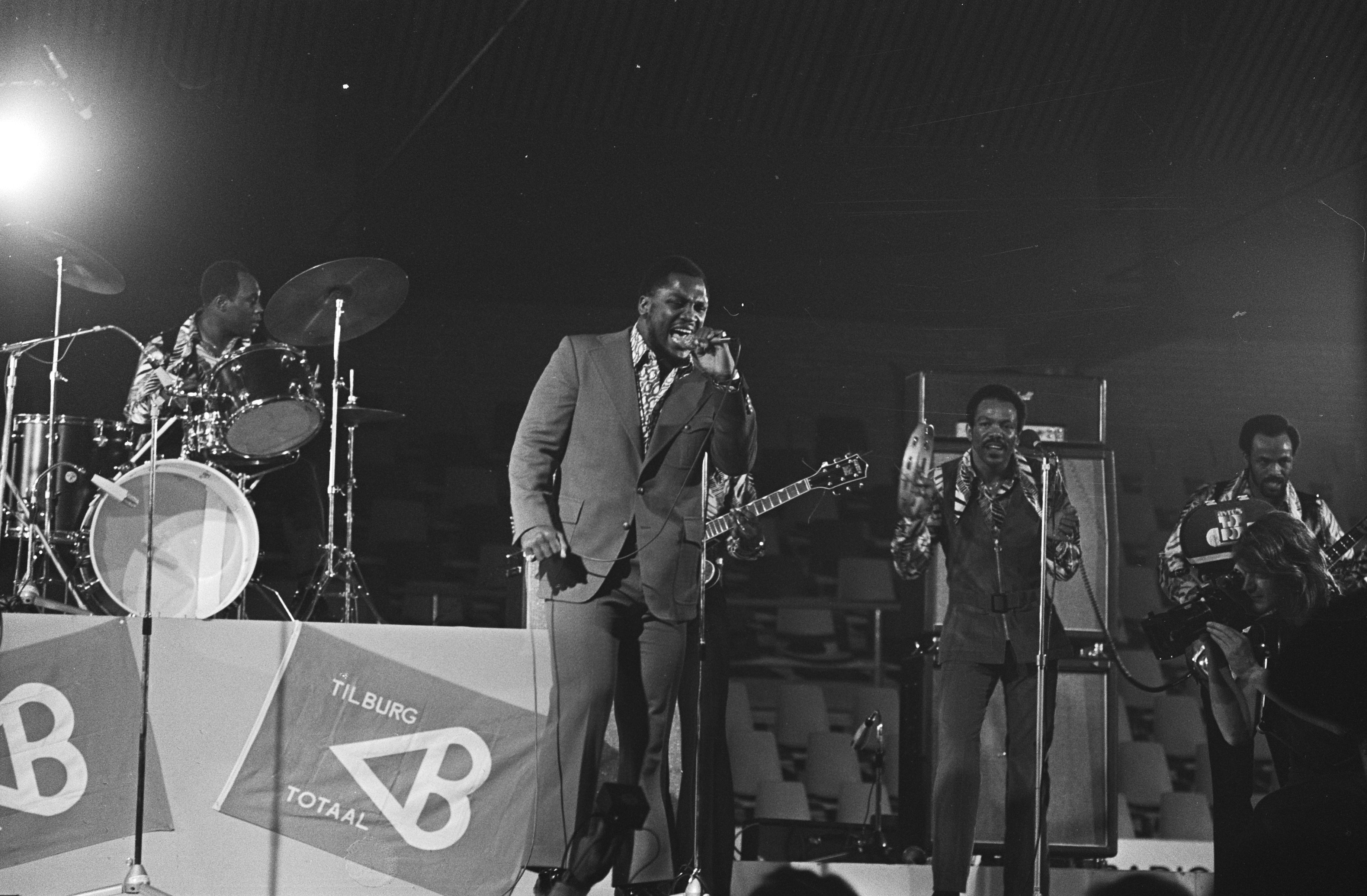 Collectie / Archief : Fotocollectie Anefo Reportage / Serie : [ onbekend ] Beschrijving : Joe Frazier en zijn groep tijdens het concert Datum : 15 mei 1971 Locatie : Noord-Brabant, Tilburg Trefwoorden : bands, concerten, musici, zangers Persoonsnaam : Frazier, Joe Fotograaf : Punt, […] / Anefo Auteursrechthebbende : Nationaal Archief Materiaalsoort : Negatief (zwart/wit) Nummer archiefinventaris : bekijk toegang 2.24.01.05 Bestanddeelnummer : 924-5576